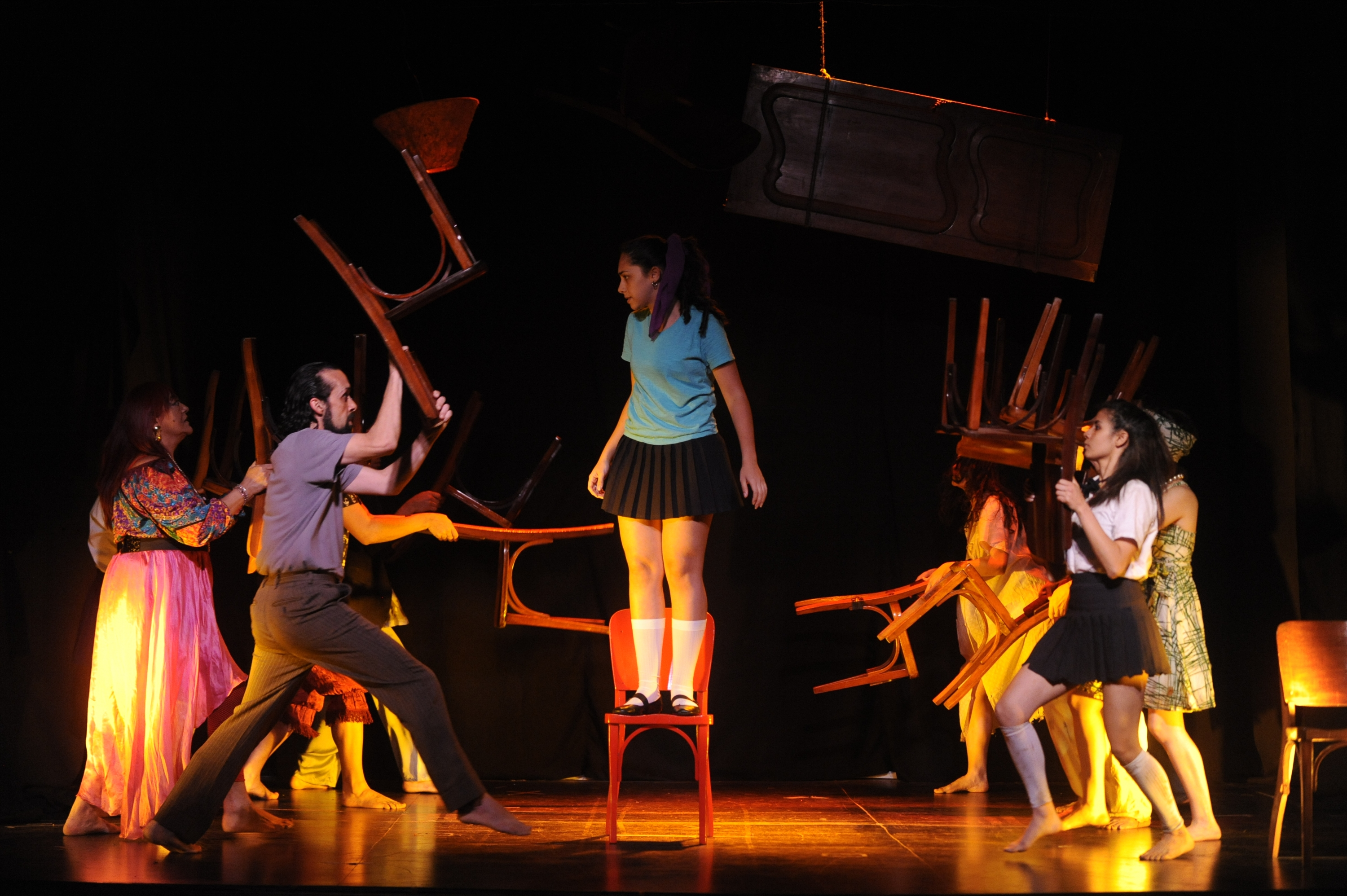 Festival de Teatro Cidade do Rio de Janeiro, no Teatro Princesa Isabel, em Copacabana. Ensaio do espetáculo "Perdoa-me por me traíres", da obra de Nelson Rodrigues, com direção de Nelson Yabeta, produzido pela Cia. Teatral Casa dos Azulejos. Foto: Fernando Frazão / Agência Brasil